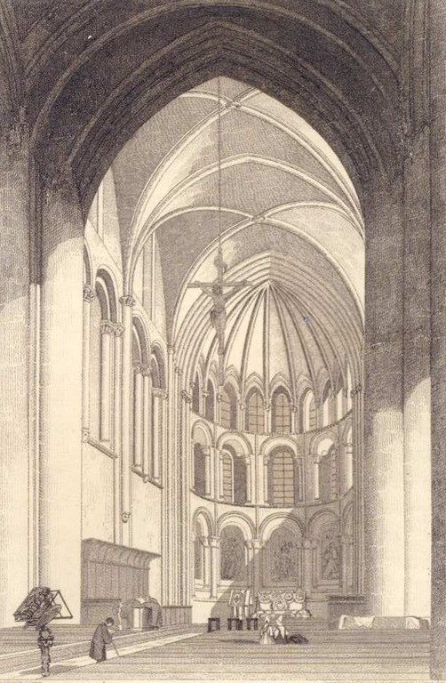 gravure